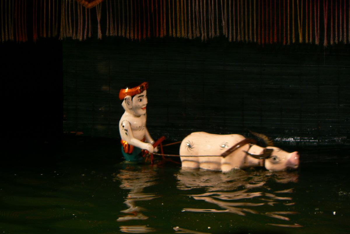 Water puppets